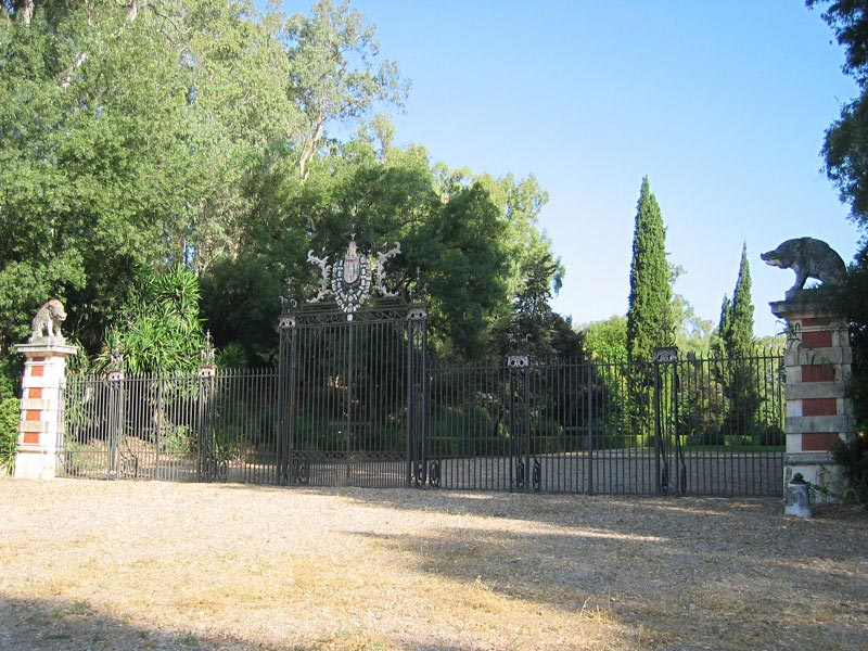 Palacio de Moratalla en Hornachuelos.